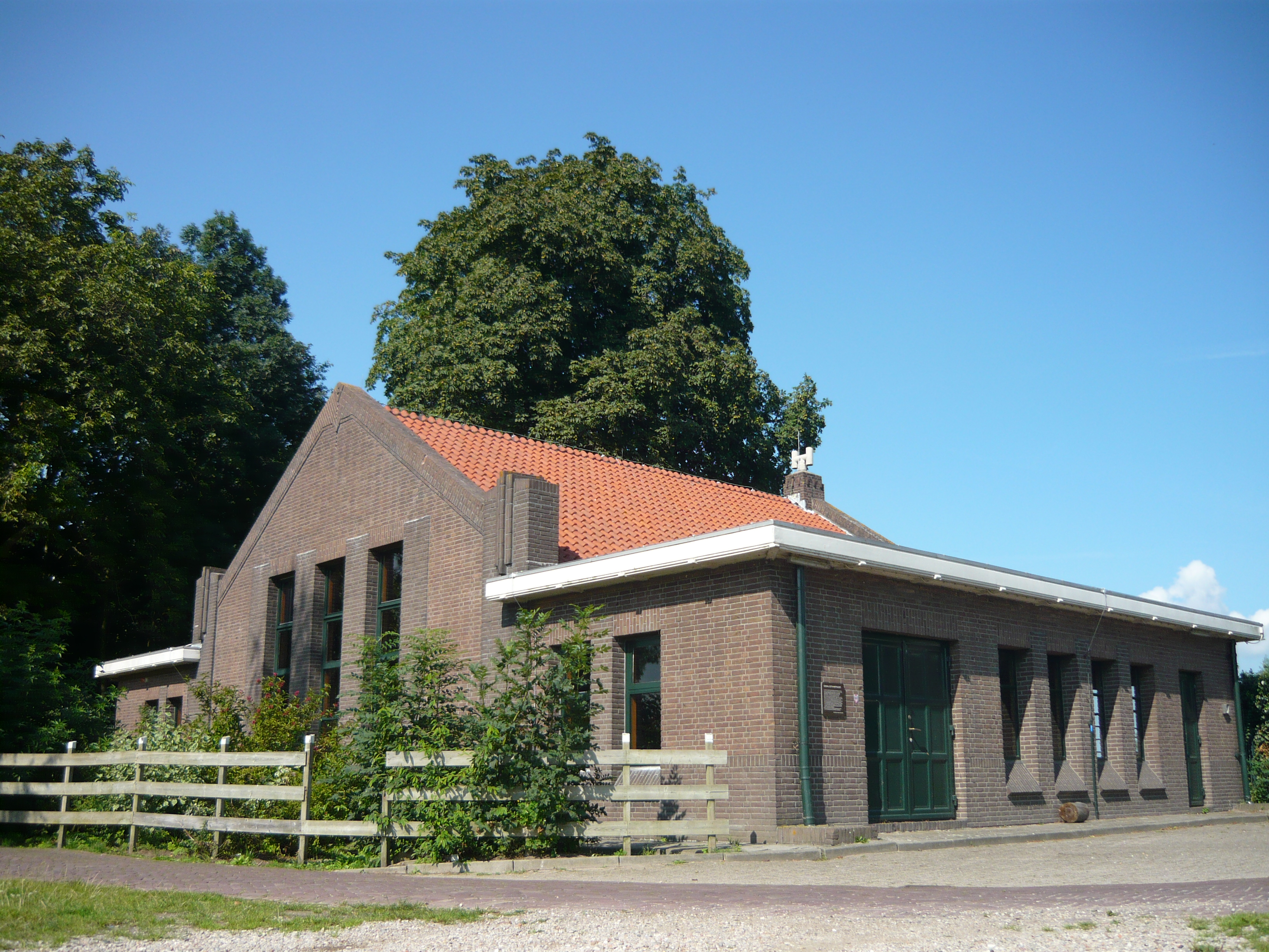 Gemaal aan de Machinekade 19 bij Maarssen ten behoeve van de Bethunepolder